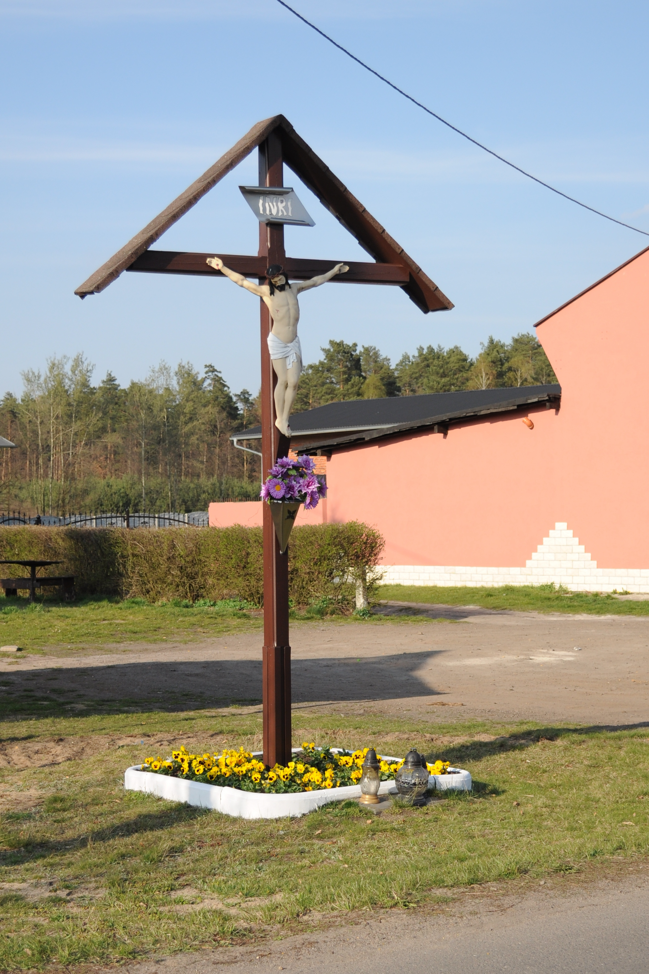 Nowa Wieś Tworoska. Krzyż przydrośny.